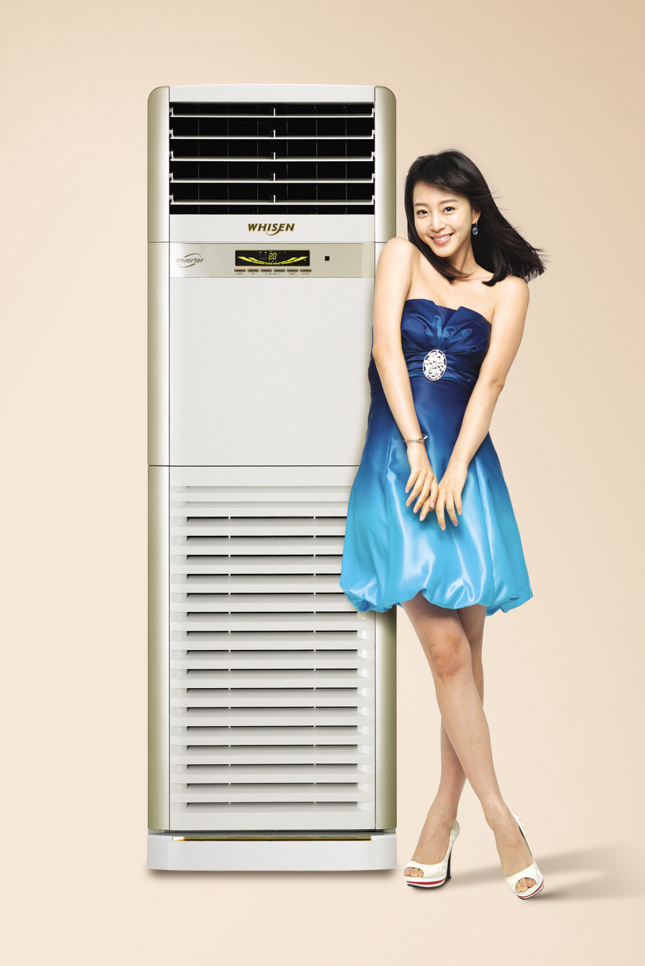 상업용 냉난방기